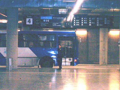 Anden de Estacion Intermodal Gabriela Mistral